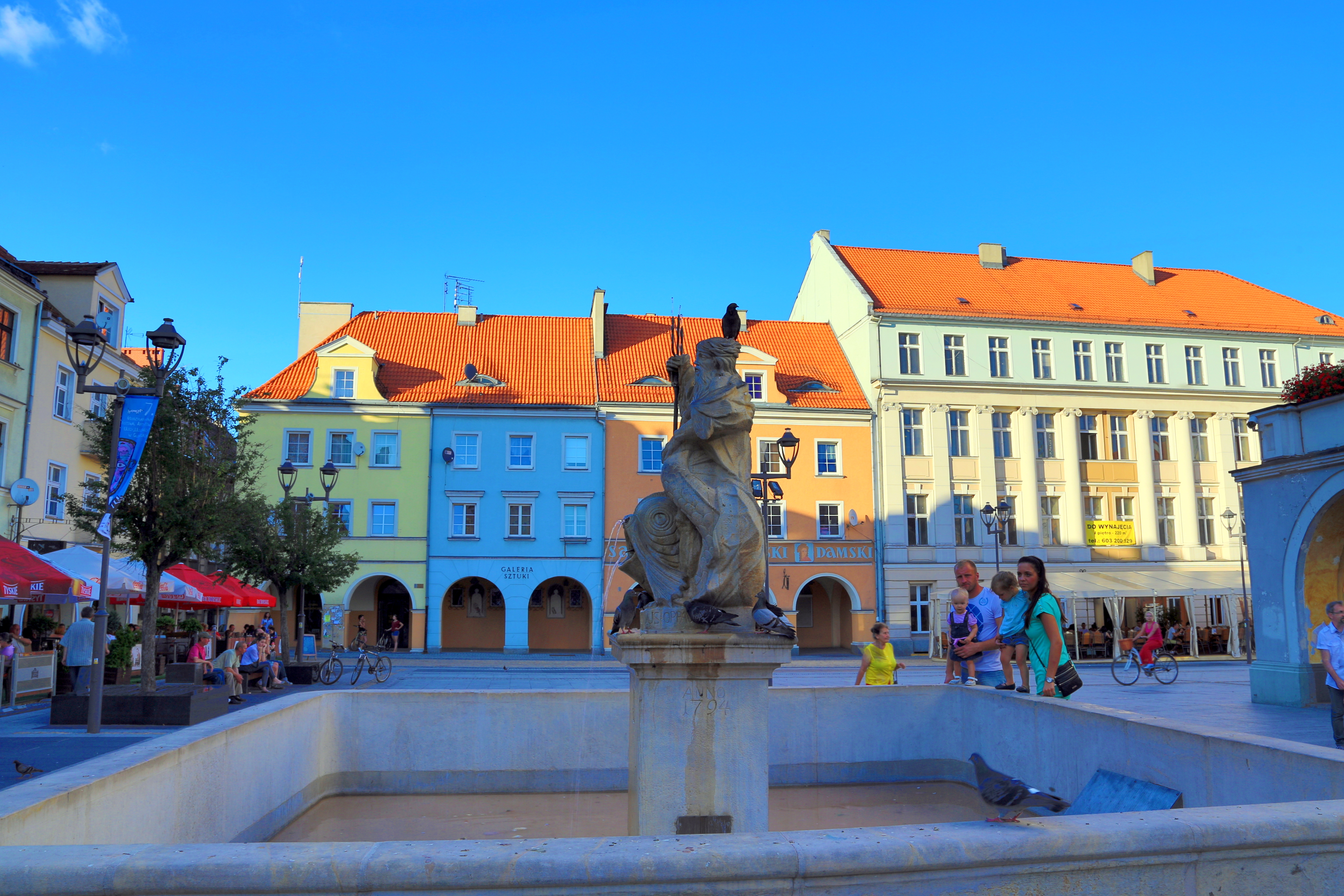 Gliwice